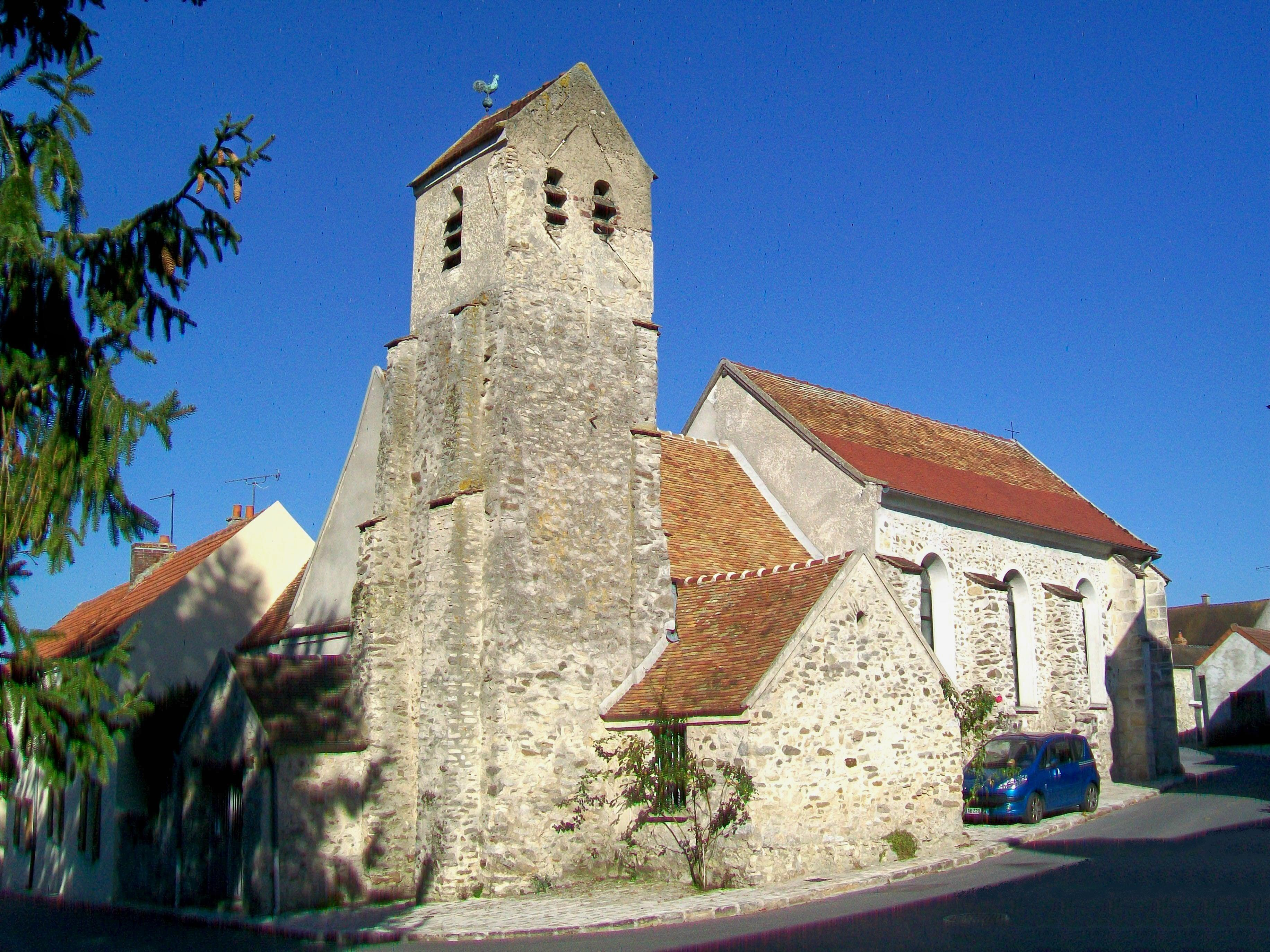 L'église Sainte-Marie.